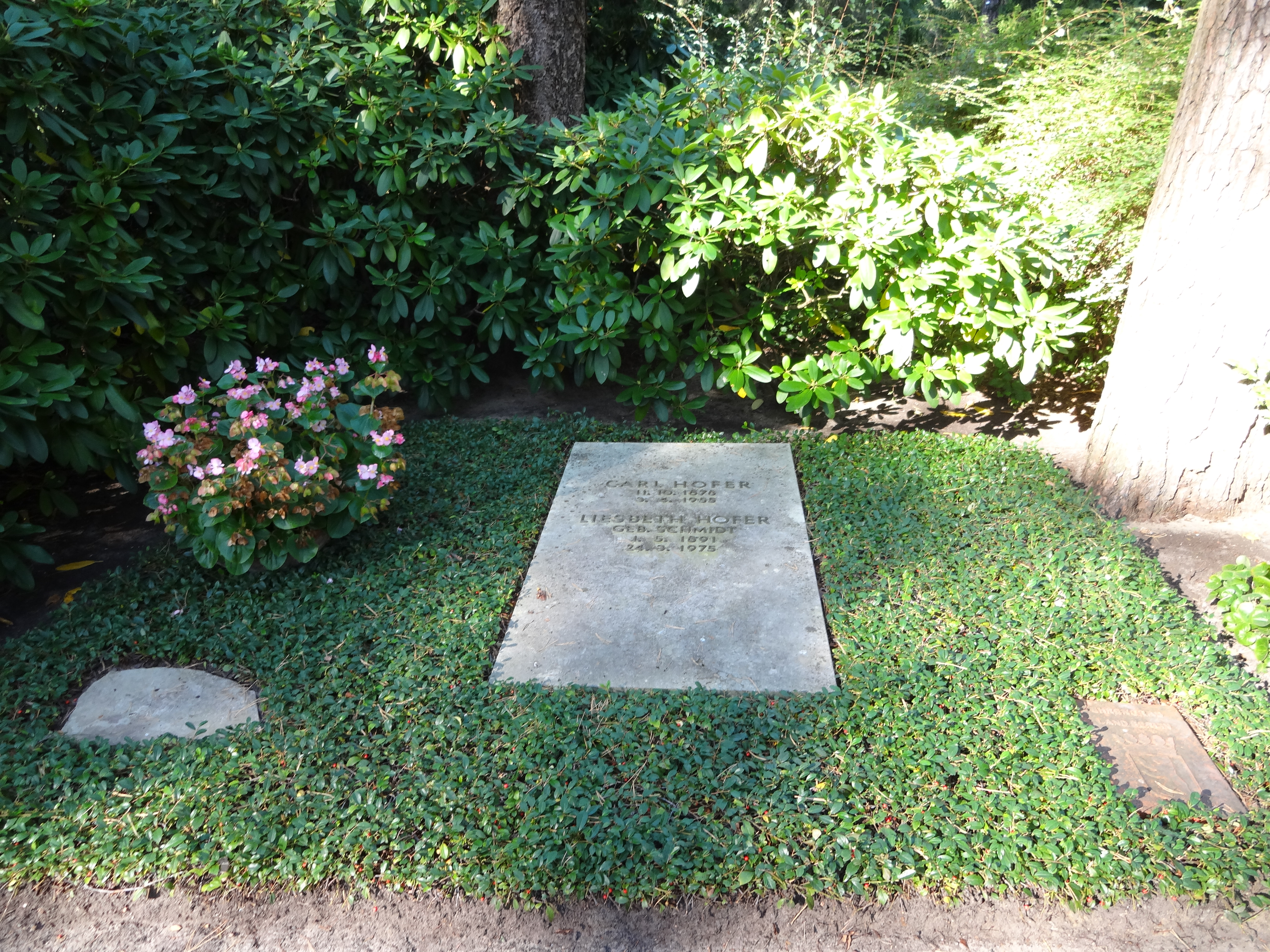 Ehrengrab für Hofer, Carl auf dem Waldfriedhof Dahlem; der Friedhof ist ein Gartendenkmal in BerlinThis is a photograph of an architectural monument.